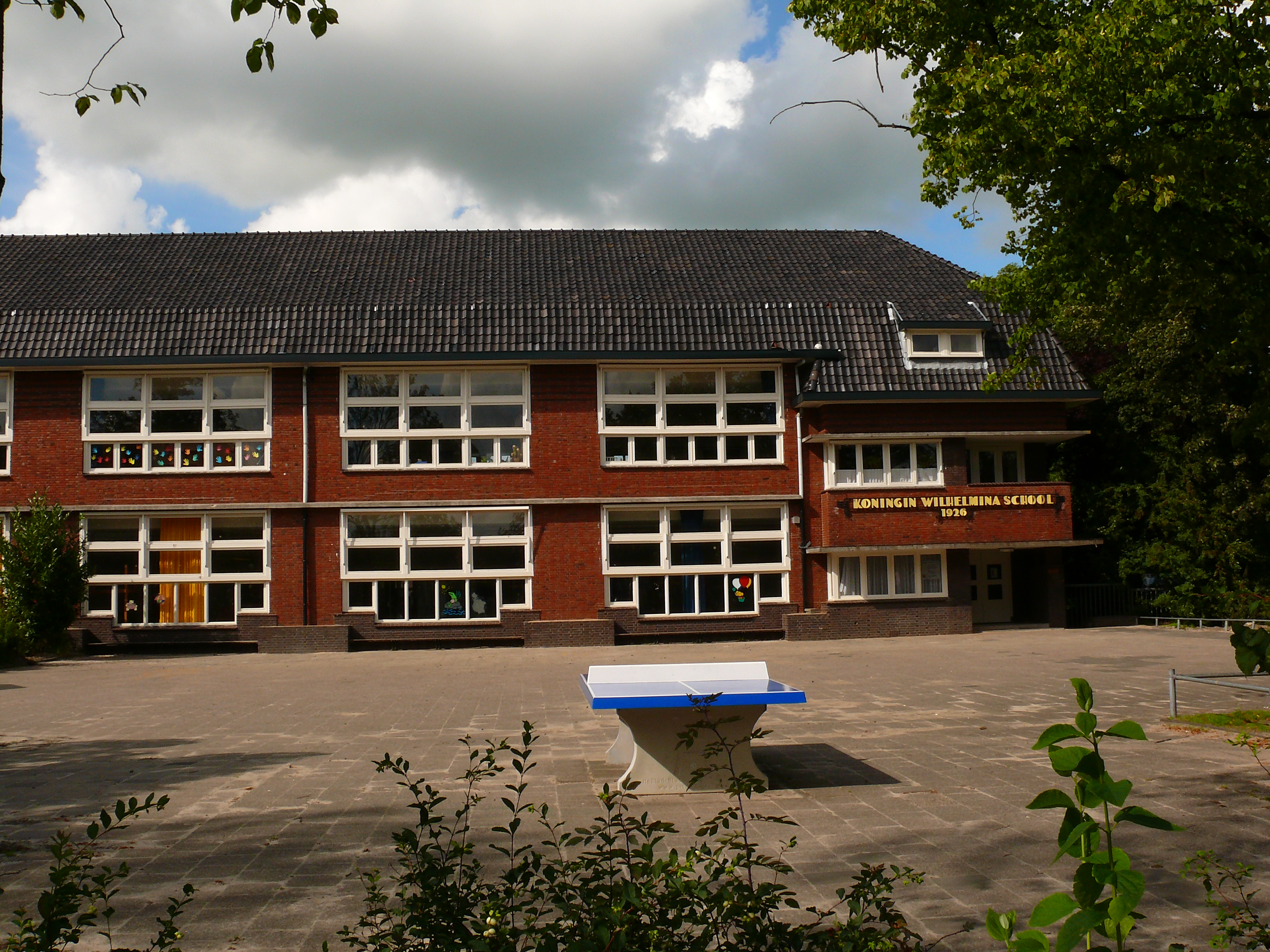 Het is een foto van de Koningin Wilhelminaschool, vestiging Fonteinstraat, in Leeuwarden